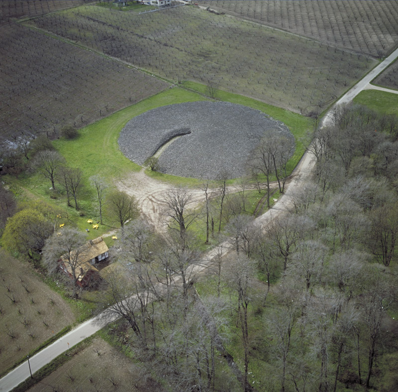 Raä-nr: Södra Mellby 42:1. Graven från nordost. Motiv: Södra Mellby 42:1 Nyckelord: Flygbilder, Riksintressen Kategori: Röse Raä-nr: Södra Mellby 42:1. Graven från nordost. Södra Mellby 42:1.